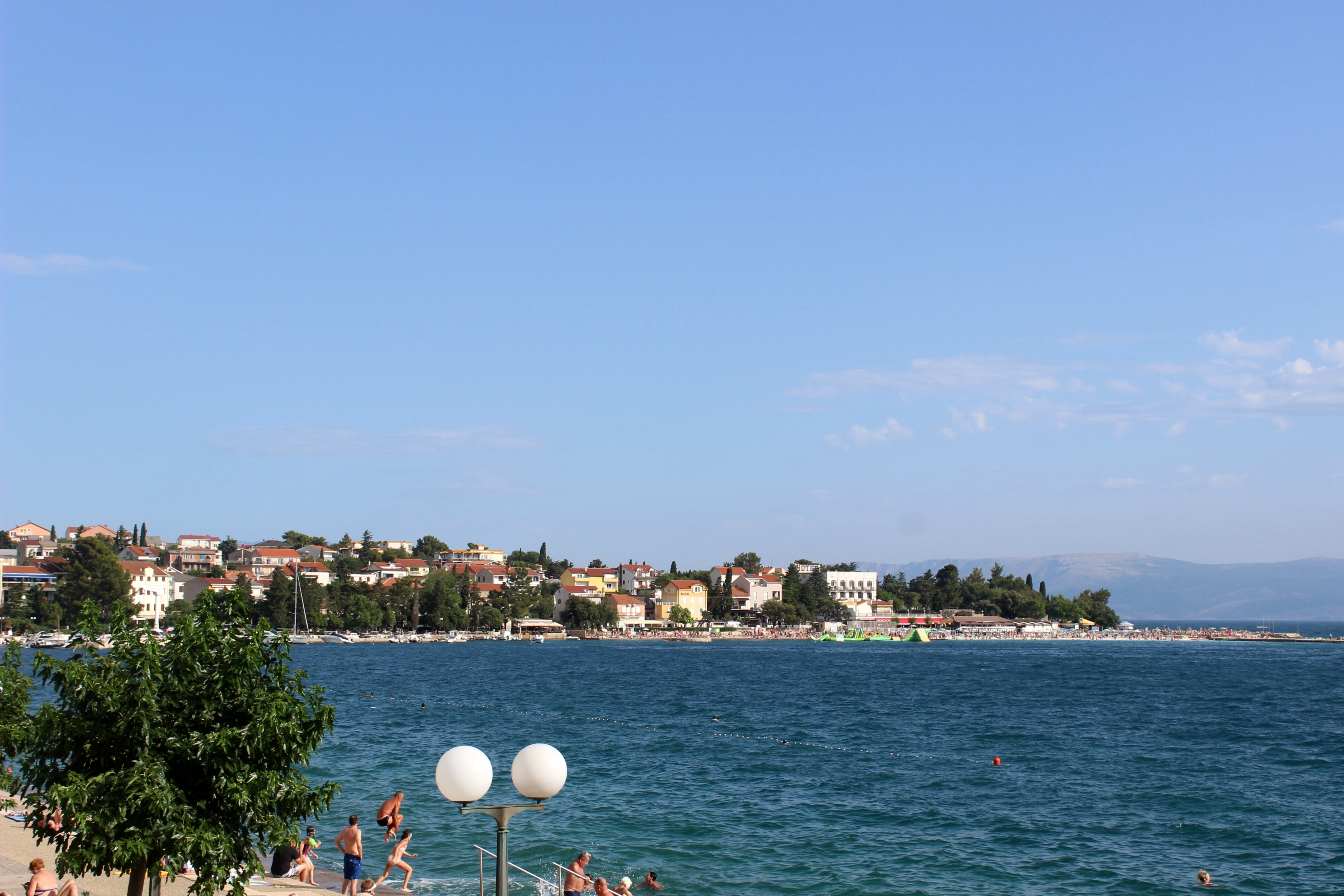 Jadranovo